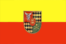 Прапор Коростишівського району